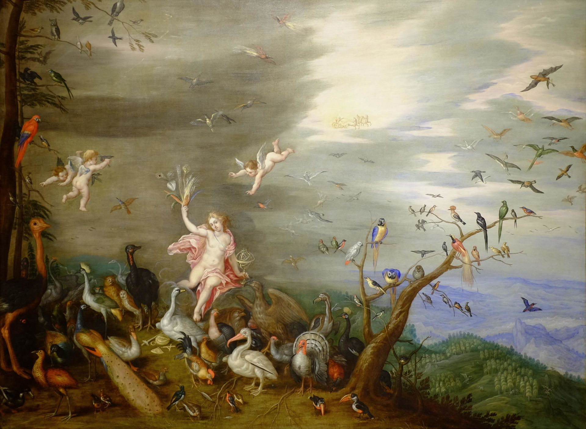 Air